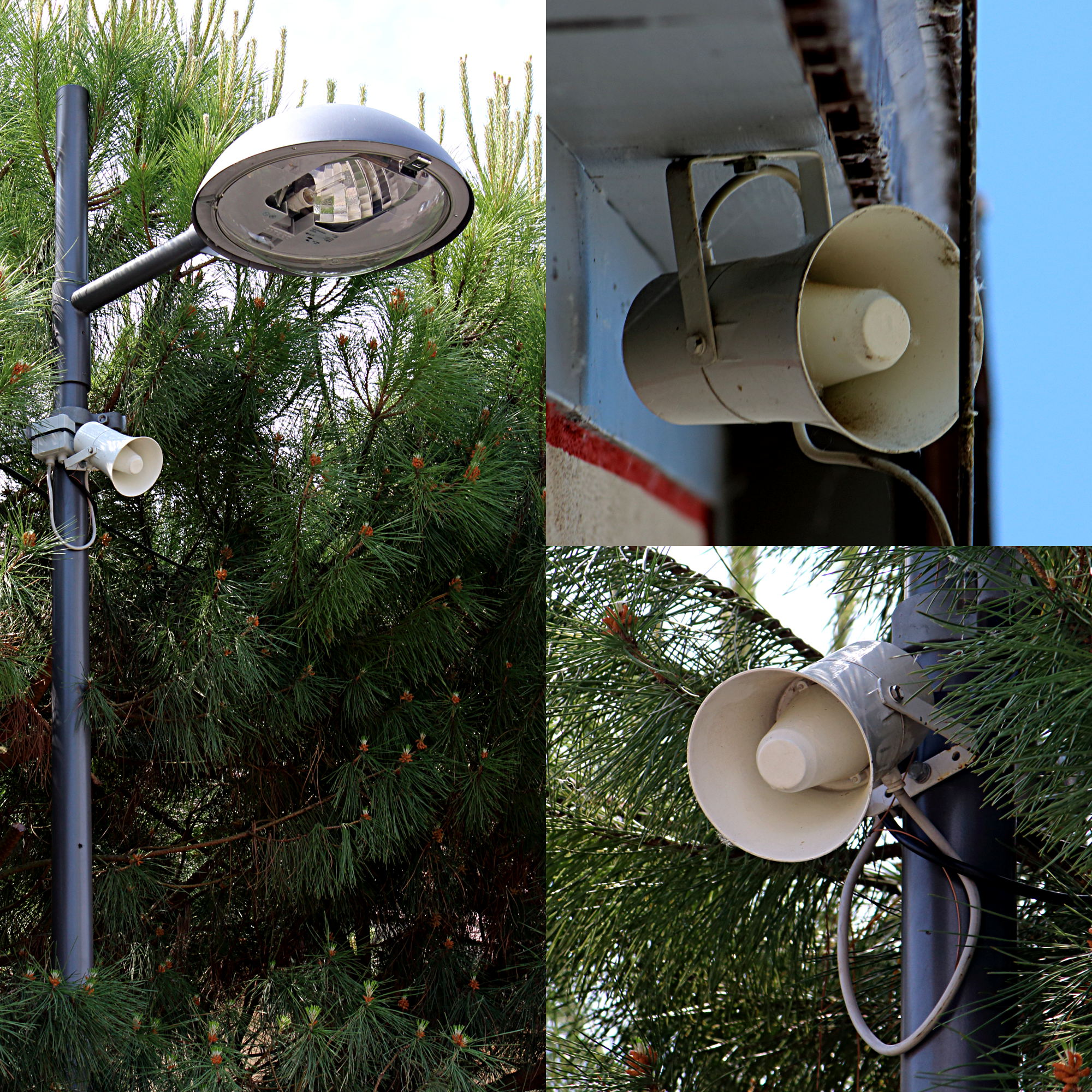 Fotomontage: Zwei Lautsprecher der Ortsrufanlage in Duttweiler.